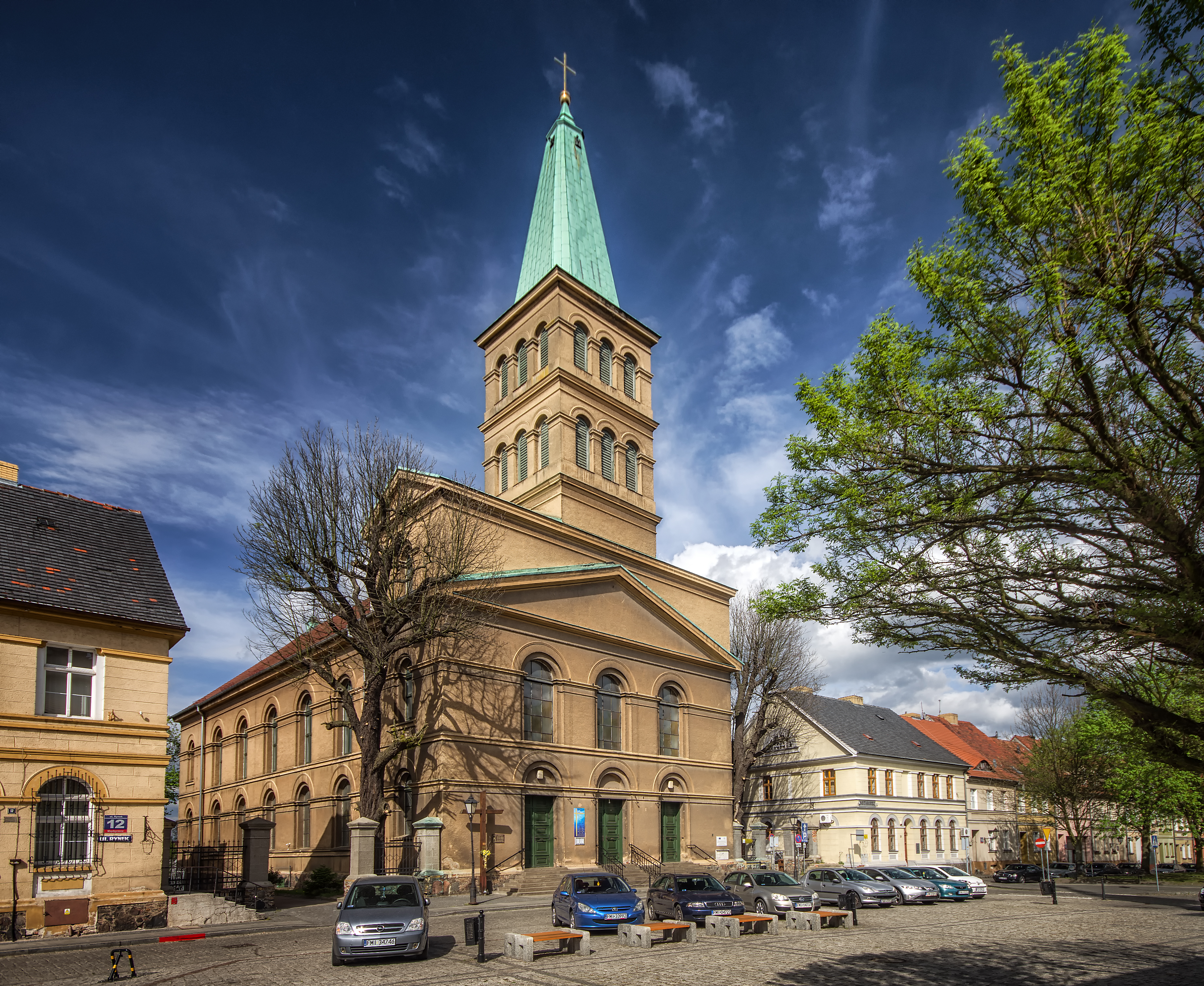 Międzyrzecz, kościół ewangelicki. ob. rzym.-kat. fil. pw. św. Wojciecha, 1834